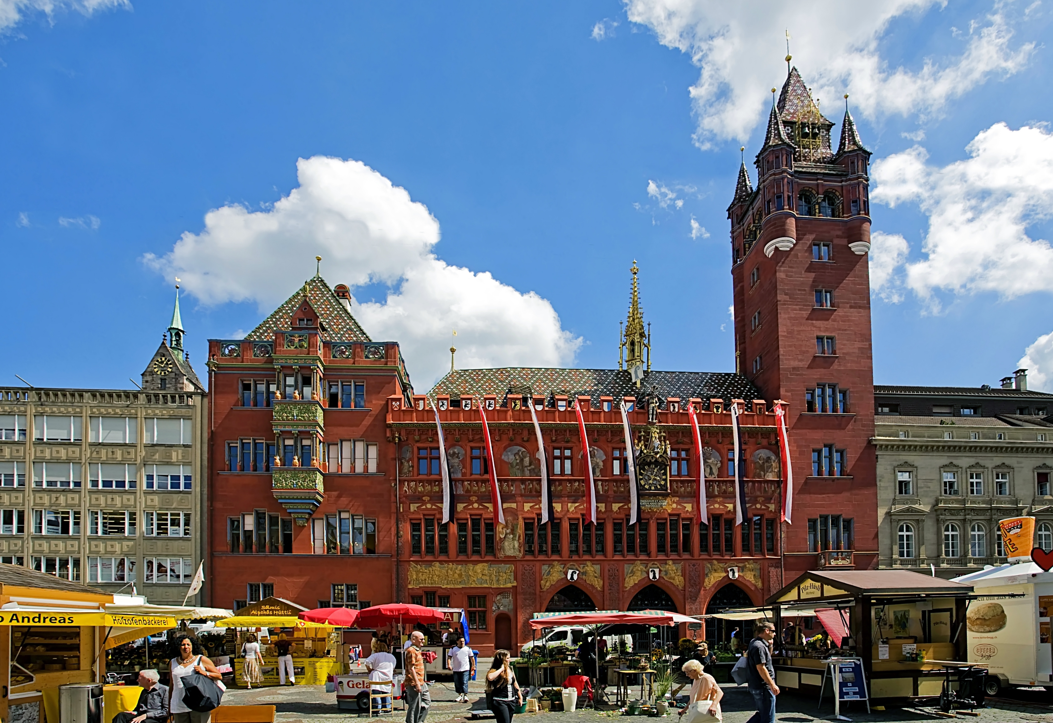 Ayuntamiento de Basilea siglo XV